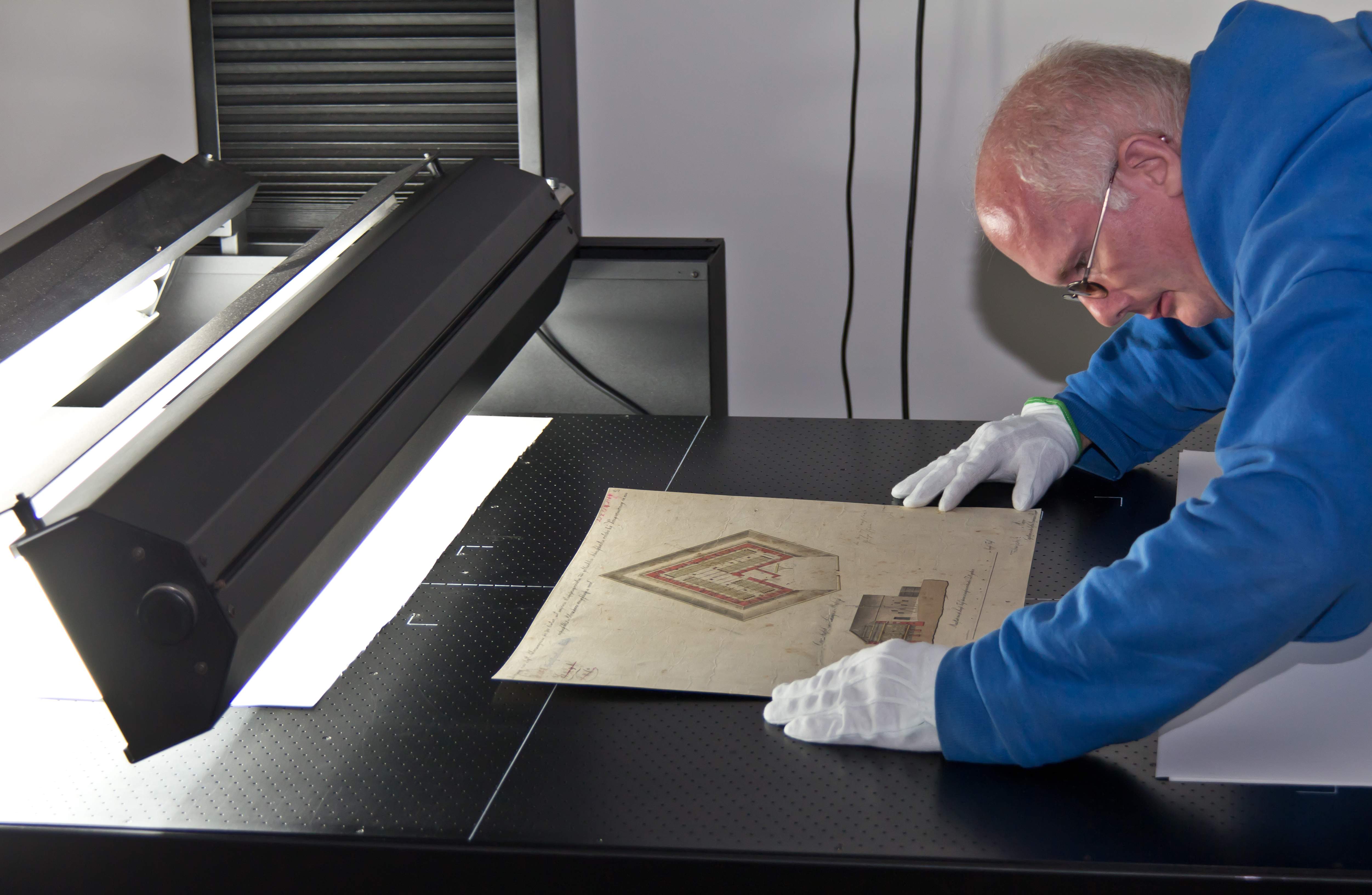 Pressetermin zur Inbetriebnahme der Gefriertrocknungsanlage im Restaurierungs- und Digitalisierungszentrum des Historischen Archiv der Stadt Köln. Foto: Vorbereitung einer Zeichnung zur Digitalisierung: Ausrichten auf dem Vakuumtisch.